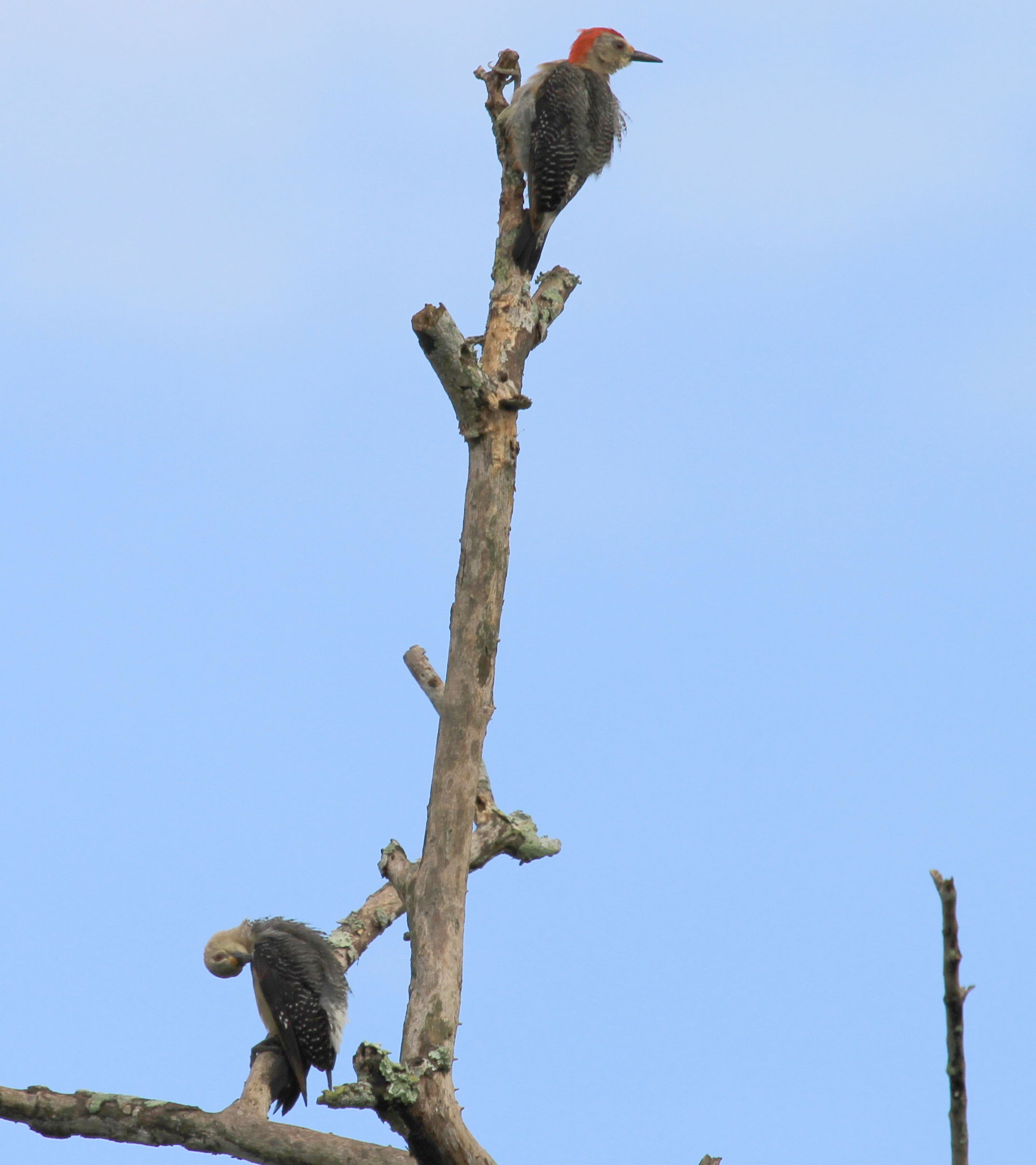 Melanerpes santacruzi grateloupensis, San Juan Evangelista, Veracruz, Mexico.